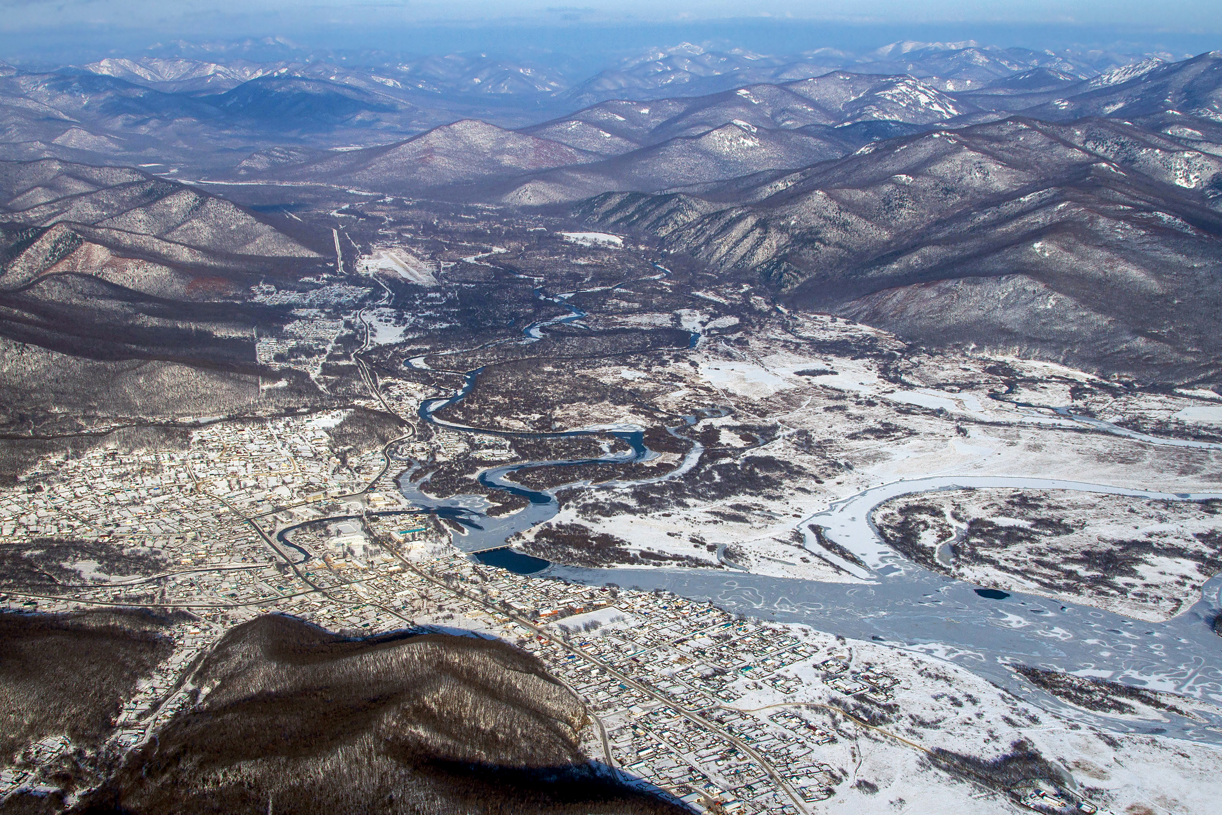 Вид на Терней из самолета DHC-6